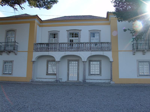 Casa da Cerca - Centro de Arte Contemporânea - Almada